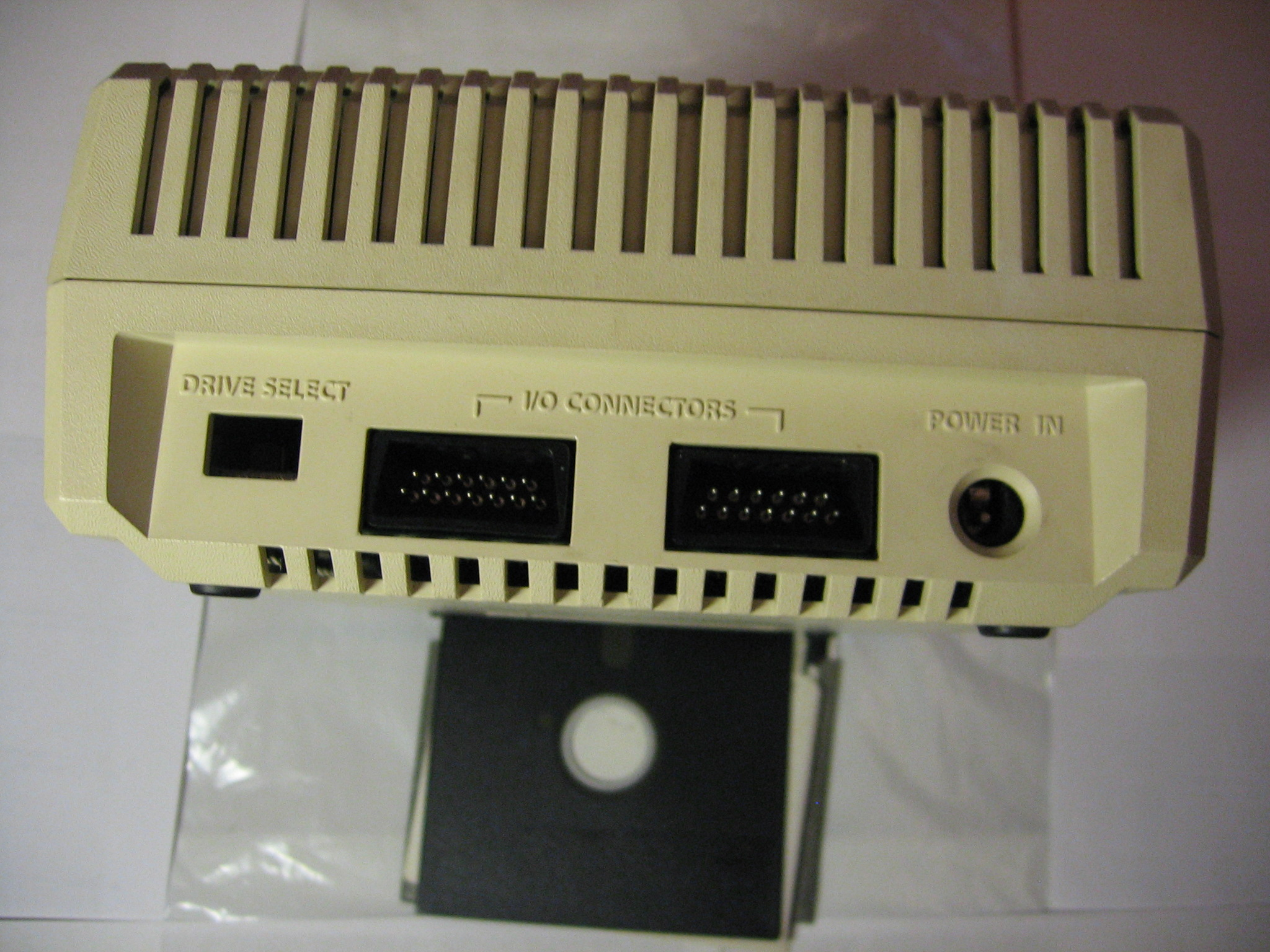 Atari 1050 - задняя панель